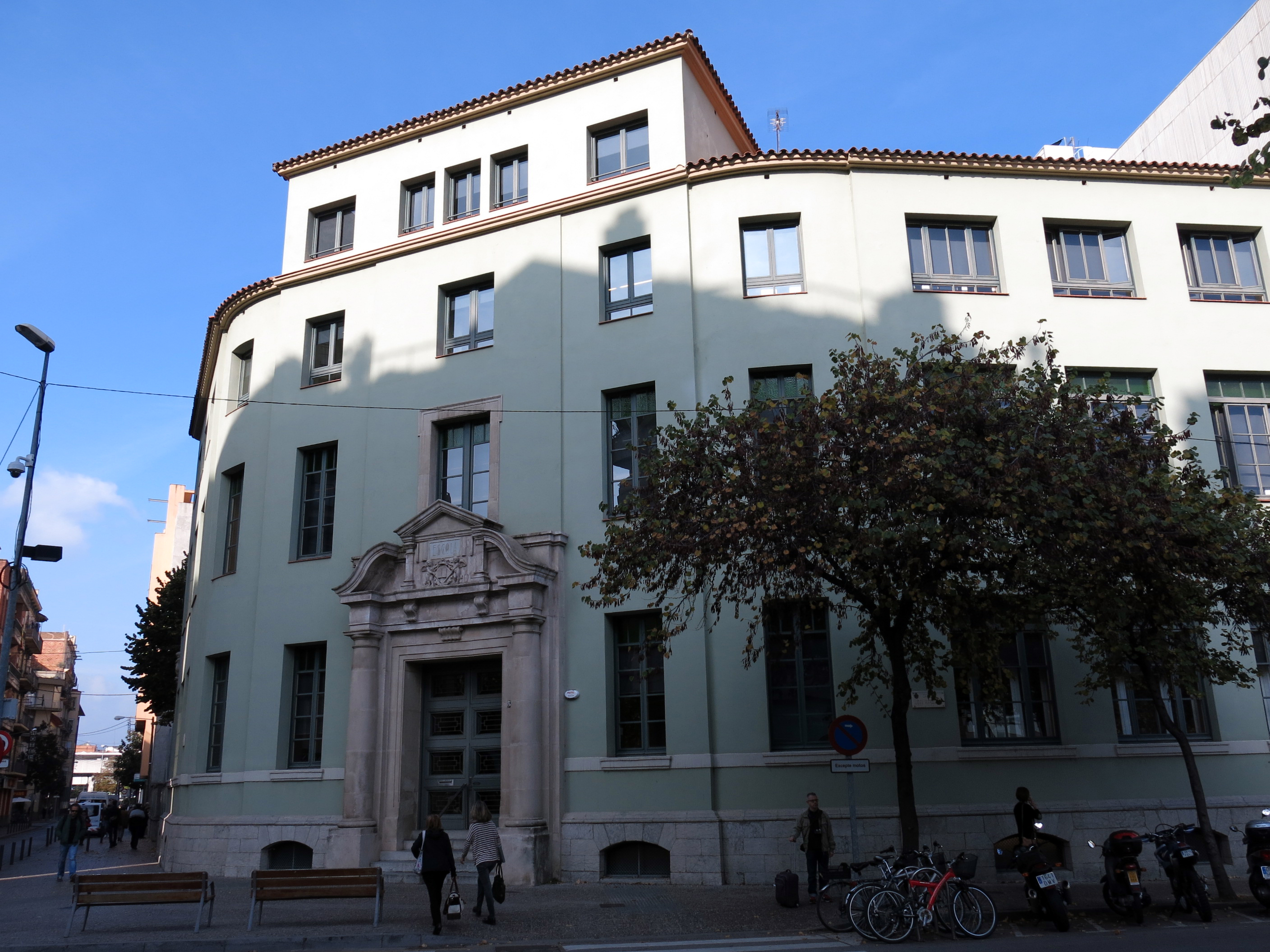 Col·legi Verd (Girona)